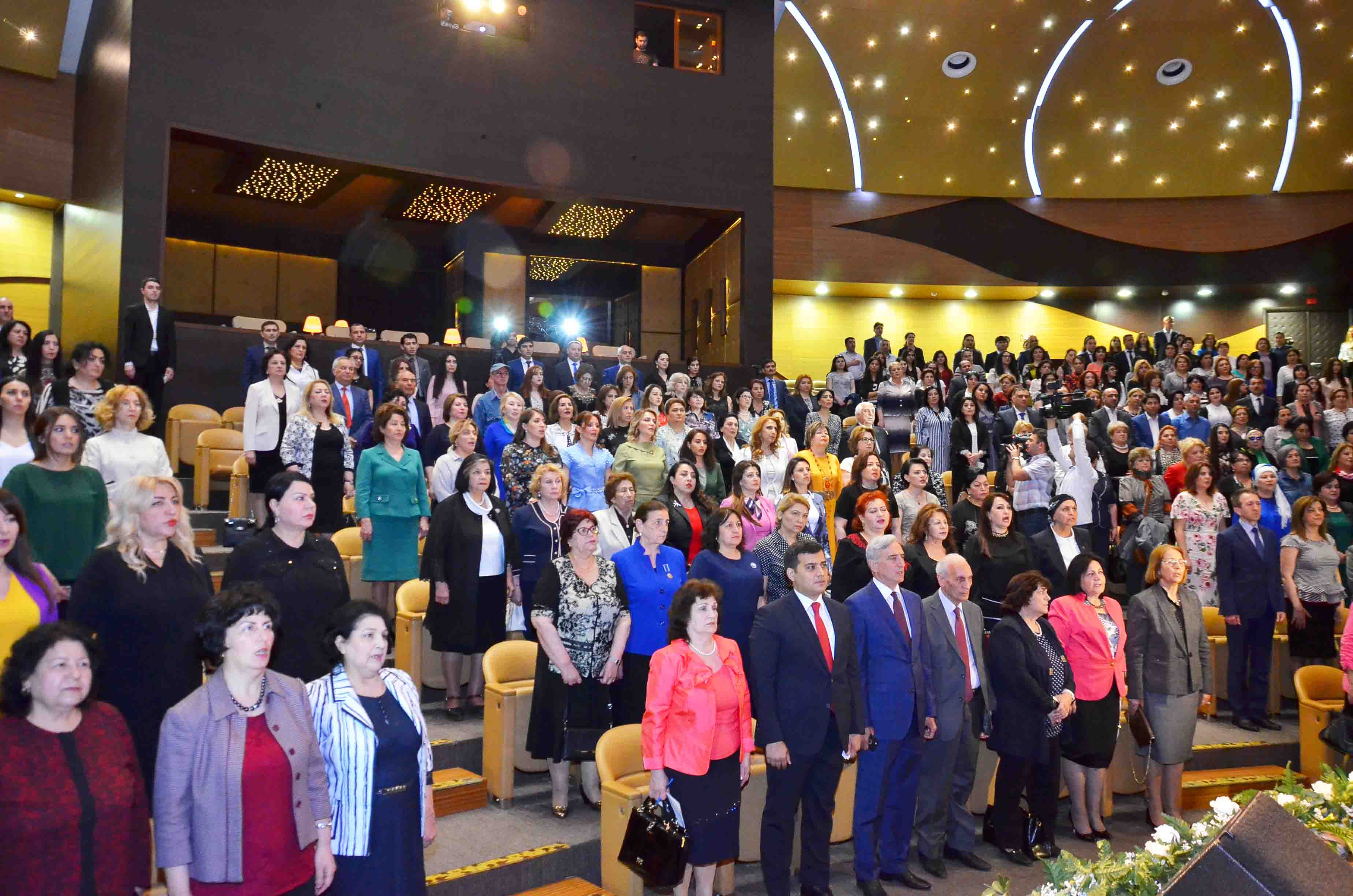 Cümhuriyyətə İşıq Saçan Qadınlar